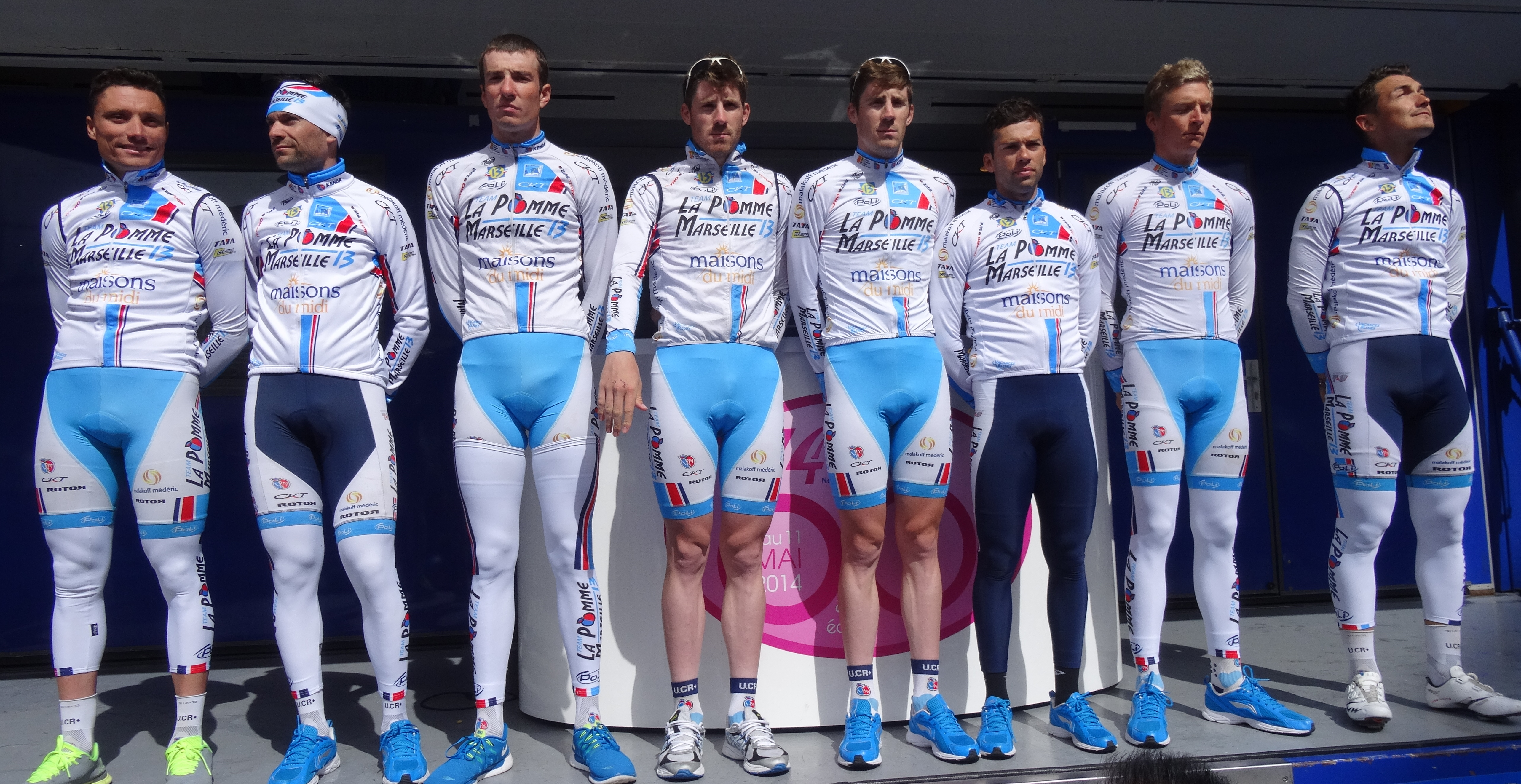 Reportage photographique réalisé le mercredi 7 mai 2014 au départ de la première étape de l'édition 2014 des Quatre jours de Dunkerque à Dunkerque, Nord, Nord-Pas-de-Calais, France. Depicted people: Benjamin Giraud, Julien Antomarchi, Yoann Paillot, José Gonçalves, Domingos Gonçalves, Julien El Fares, Clément Saint-Martin and Thomas Rostollan Depicted team: La Pomme Marseille 13